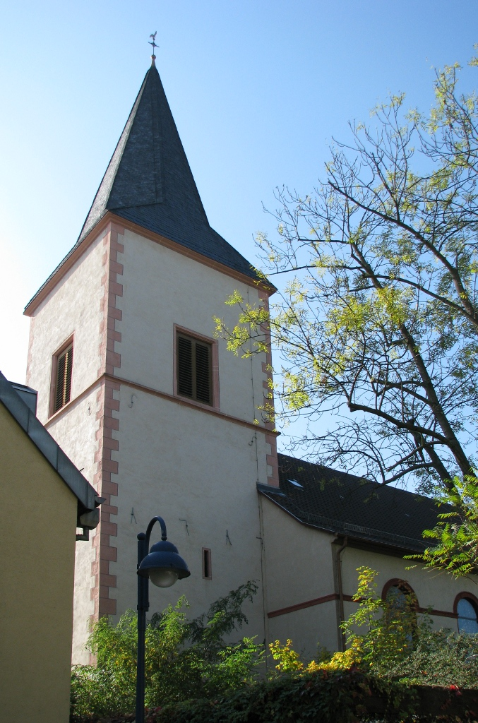 Unionskirche in Mannheim